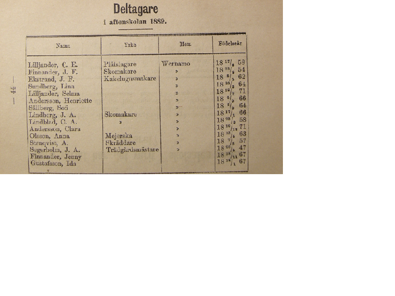 Deltagare i Värnamo Folkhögskolas aftonkurs 1889